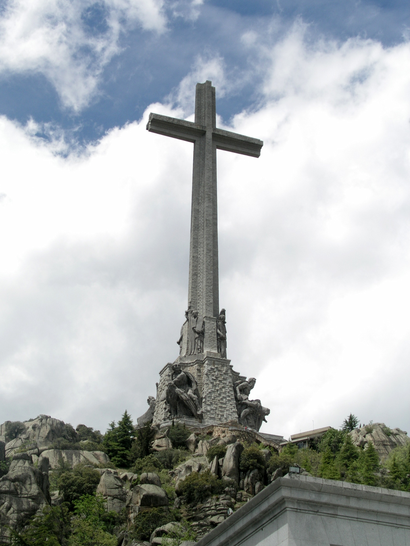 Valle de Los Caidos, Madrid, Spain. Cross, south side.